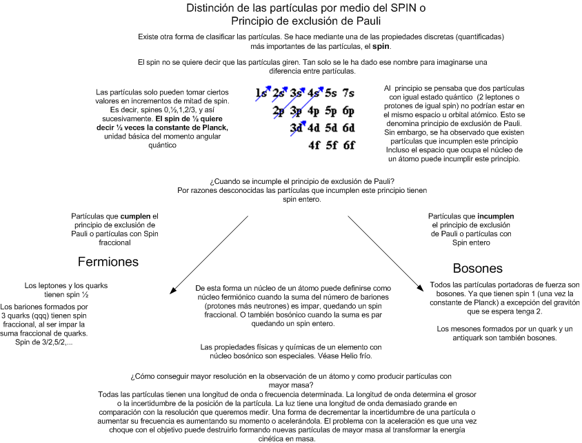 Fermiones y bosones